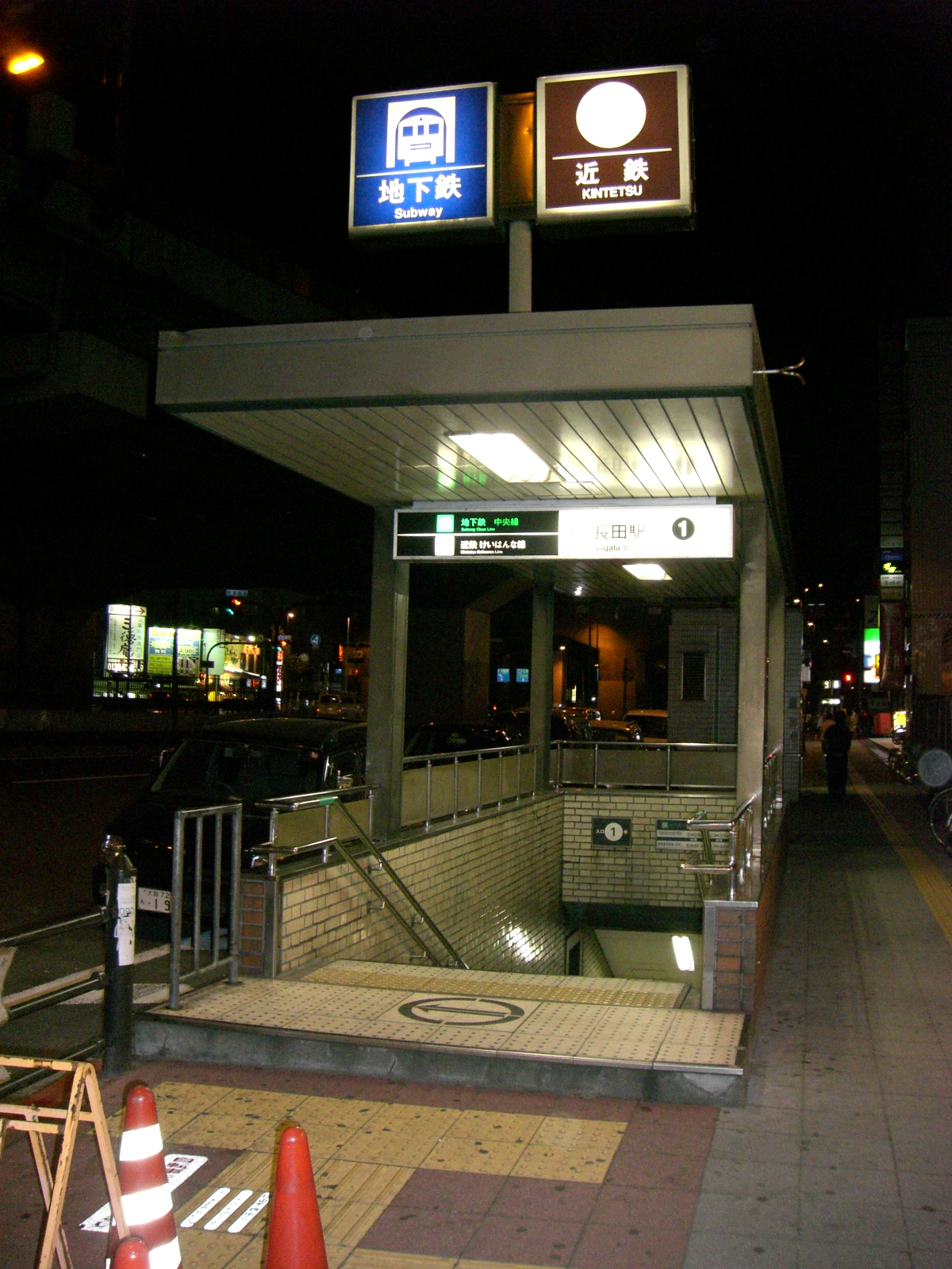 Nagata Station